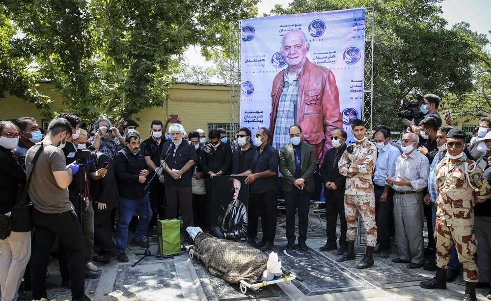 مراسم تشیع سیروس گرجستانی